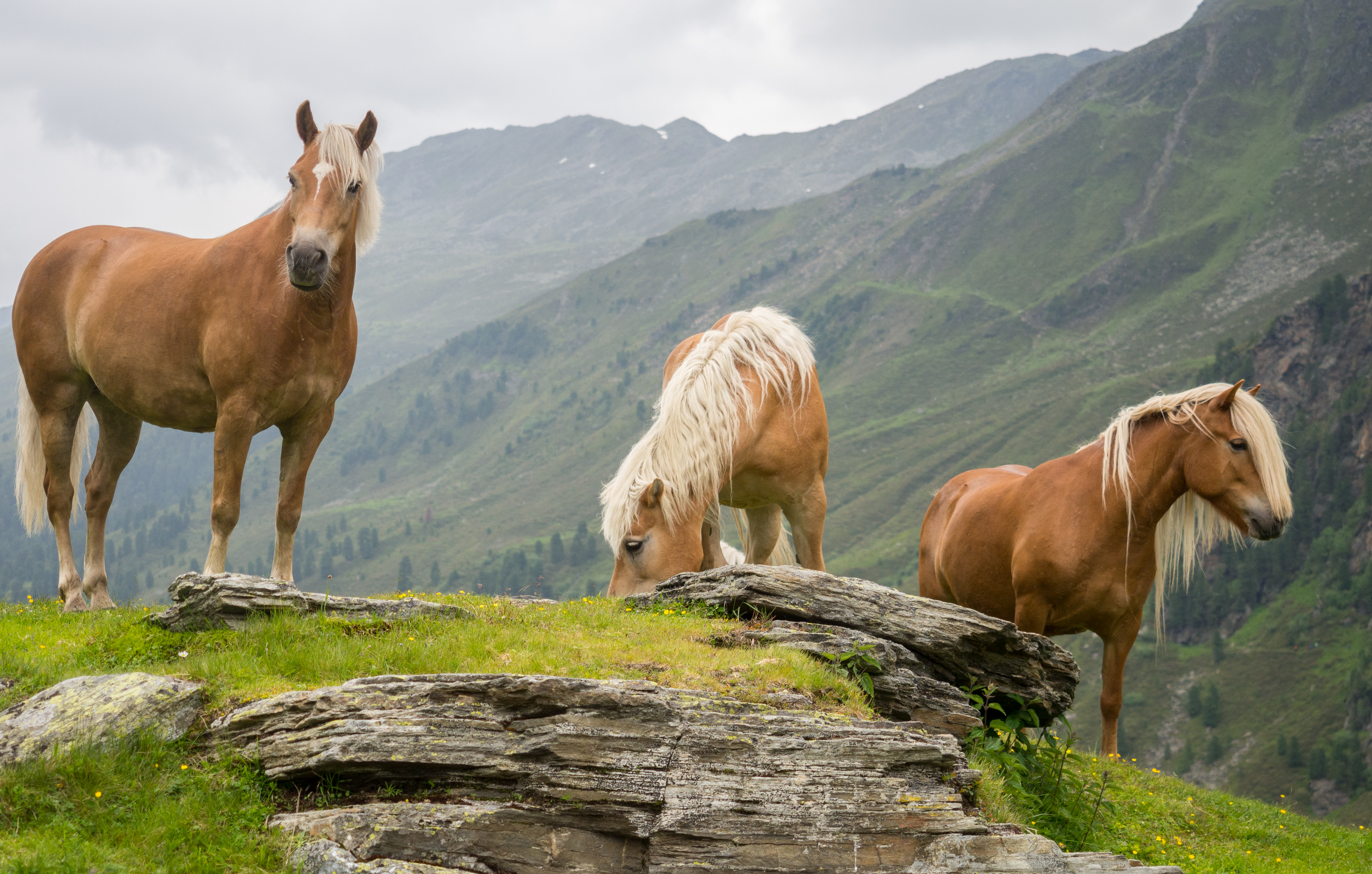 Haflinger im Fotscher Tal bei der Potsdamer Hütte